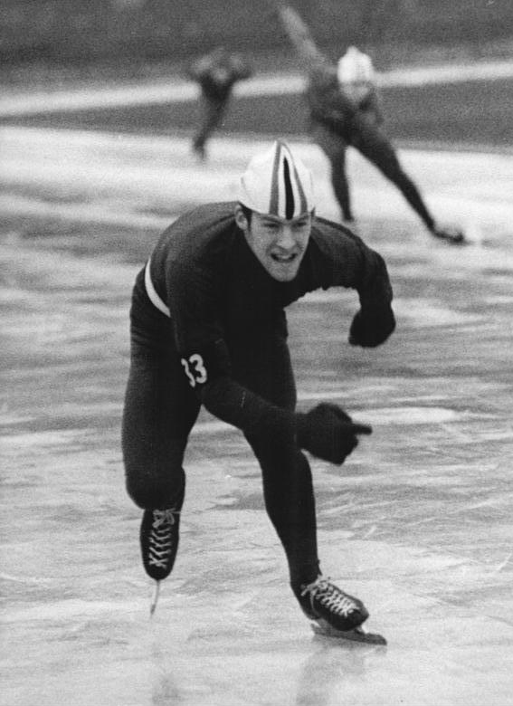 Horst Meinhardt Zentralbild Wendorf-6.2.71 Berlin: DDR-Meisterschaften im Eisschnellauf im Berliner Dynamo-Sportforum-Bei den Männern gab es am 5.2.71 einen Erfolg durch Horst Meinhardt (SC Dynamo Berlin - Foto von einem früheren Wettkampf), der über 500m in 41,5 s (persönliche Bestzeit) zum Sieg kam.